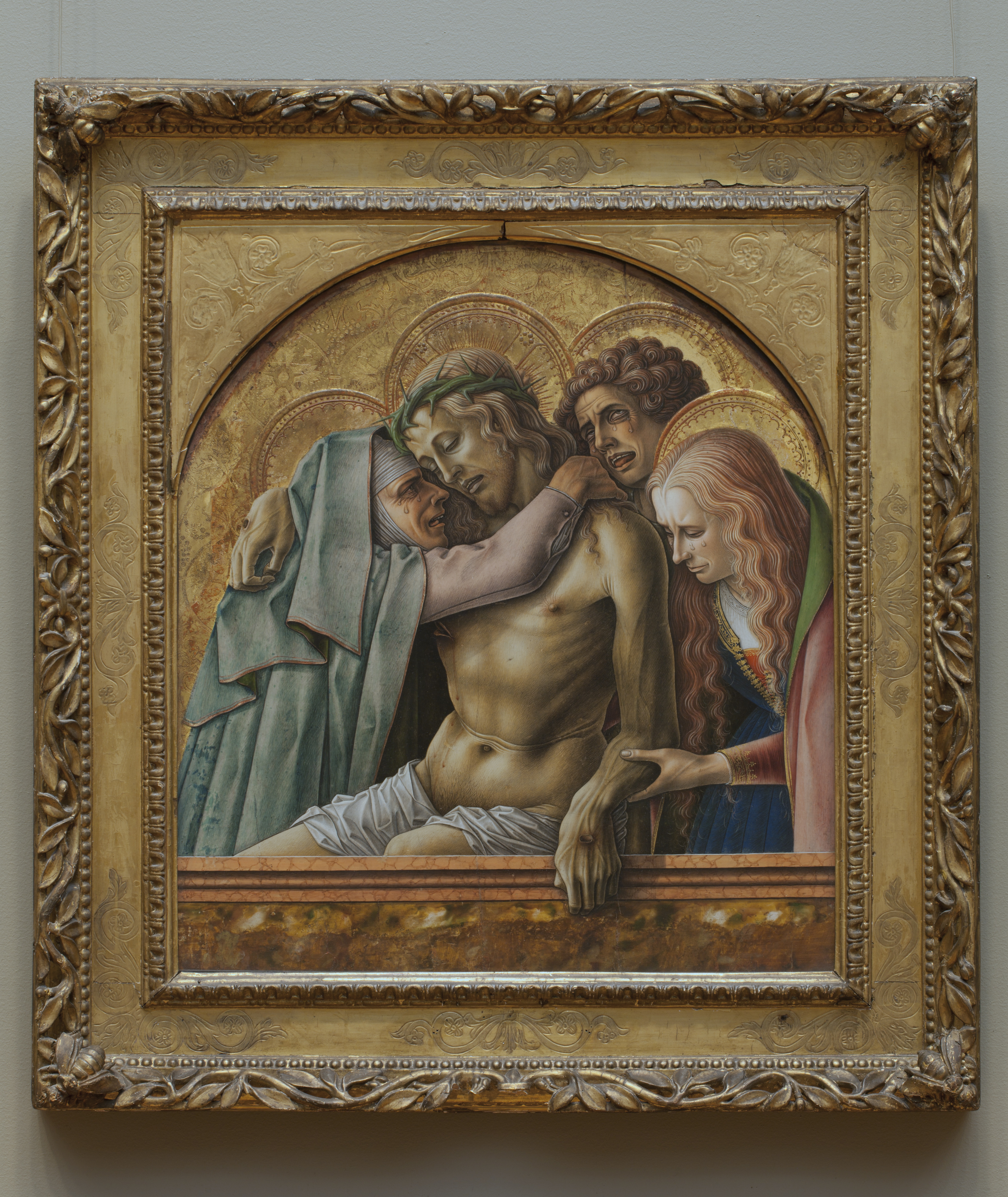 Painting; Paintings